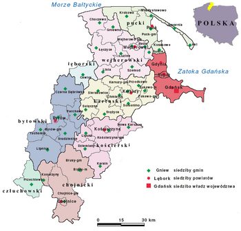 Leihgabe von der polnischen Wikipedia - dort GFDL